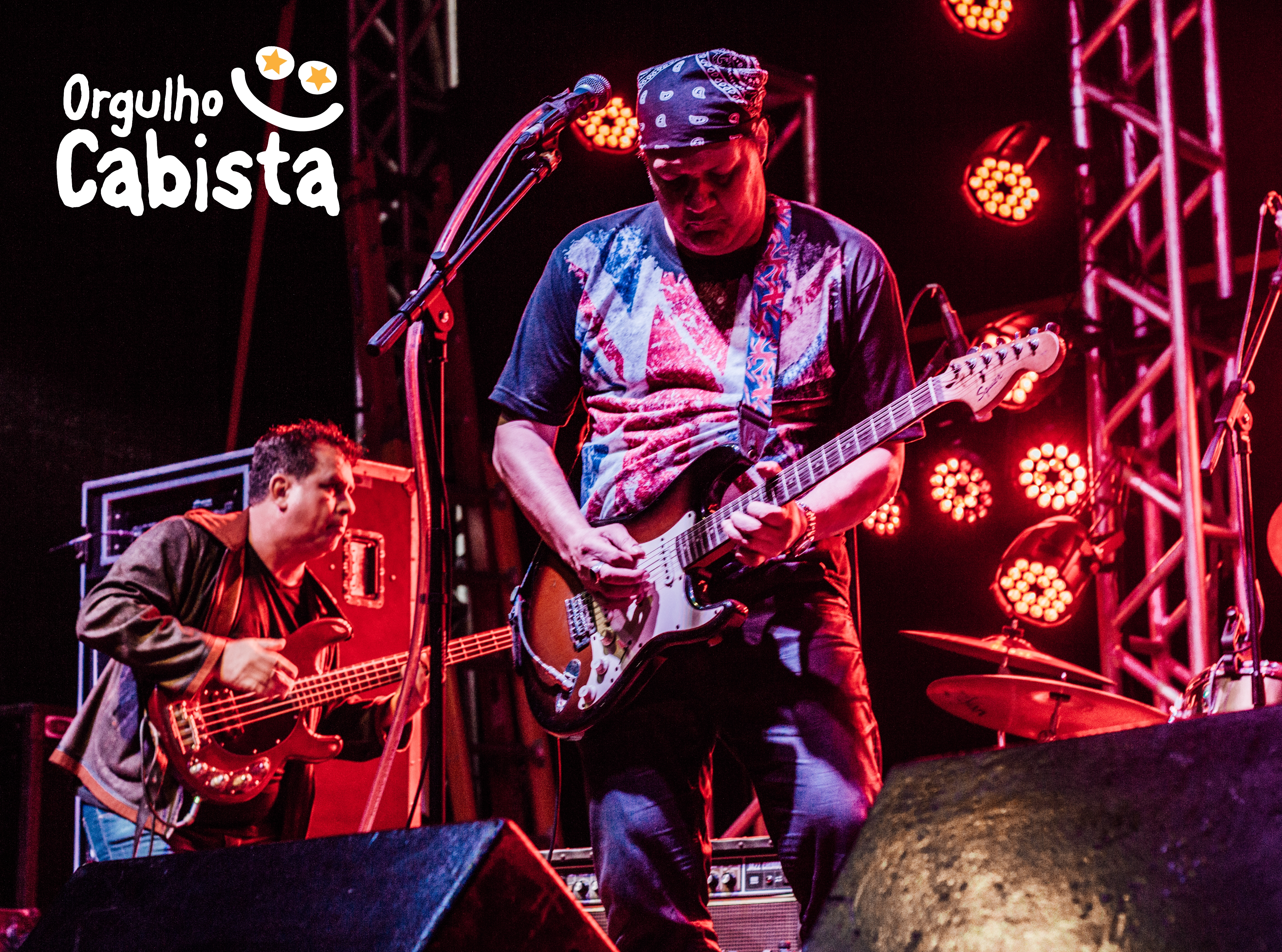 Leo Barreto é um compositor, guitarrista e cantor de Rock e Blues no Brasil. Foi um dos produtores do evento Festival de Jazz e Blues de Arraial do Cabo nos anos de 2018 e 2019.